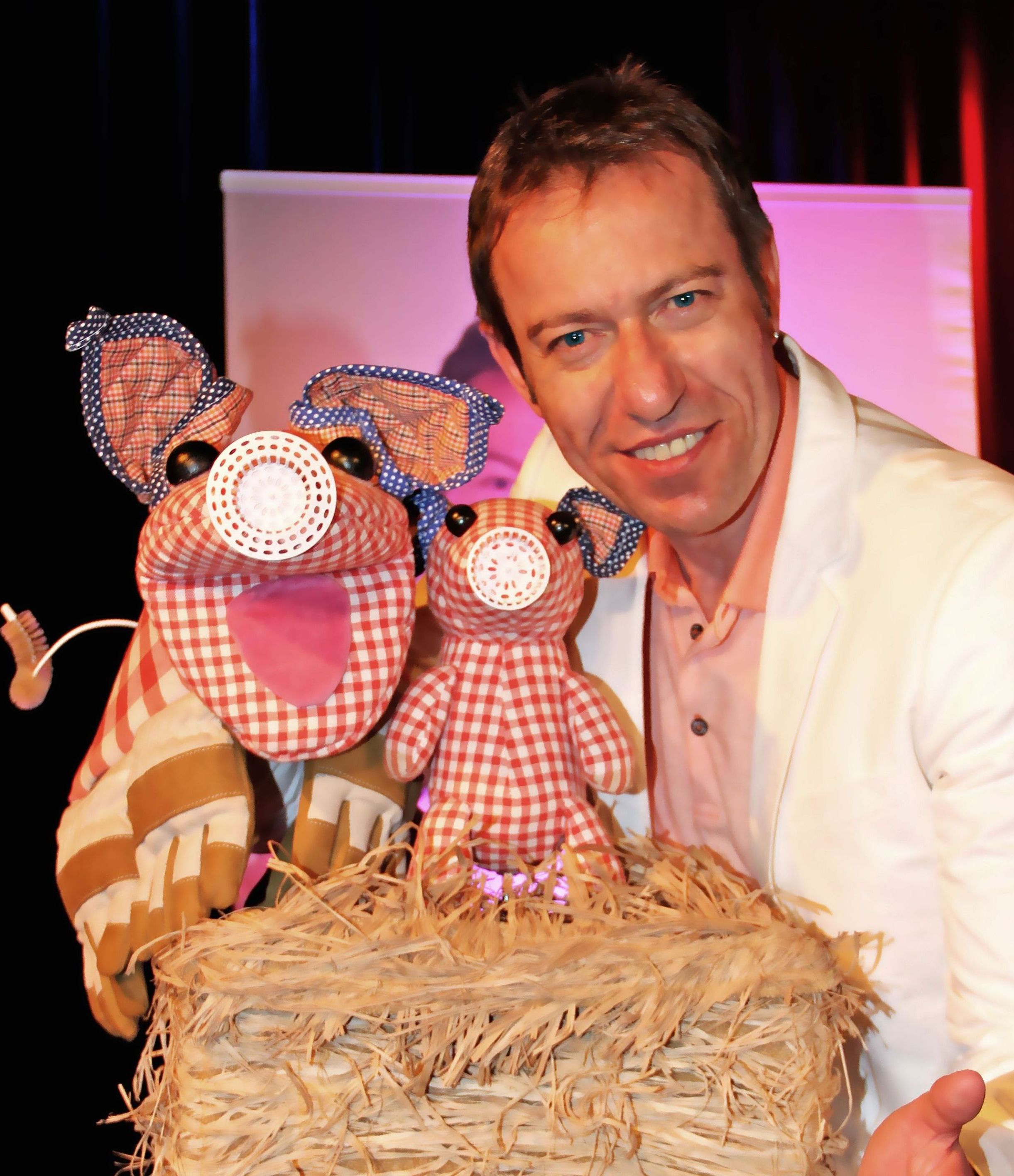 Bauchredner Peter Moreno mit einiger seiner Puppen, die aus Alltagsgegenständen wie Topfhandschuh, Topflappen usw. vor den Augen der Zuschauer entstehen. Bauchreden mal ganz anders erleben.